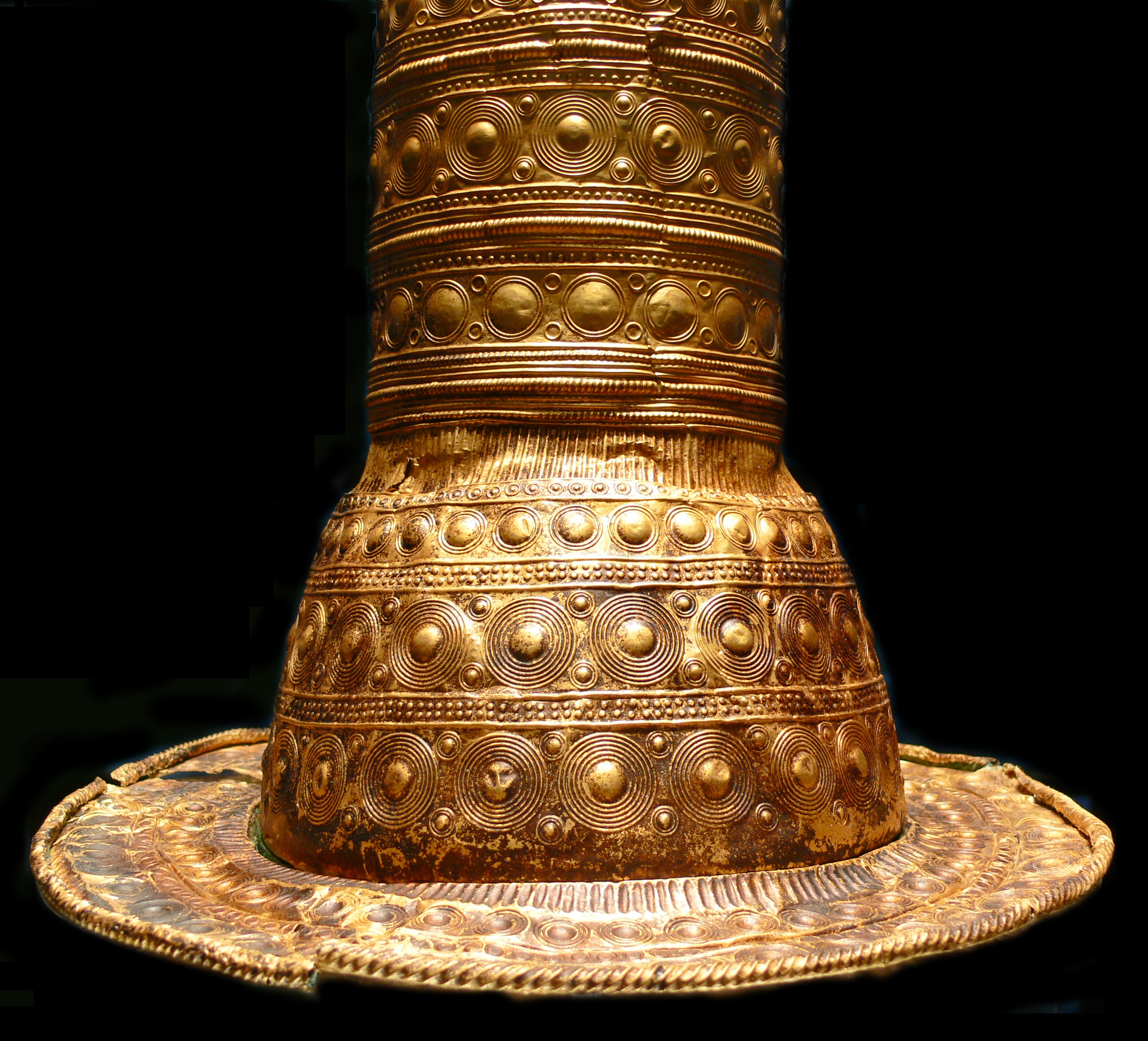 „Berliner Goldhut“, detail; Fund ohne Fundort, 1996 aus dem Kunsthandel erworben; datiert in die ausgehende Bronzezeit, ca. 1000-800 v. Chr. Collection: Museum für Vor- und Frühgeschichte Berlin